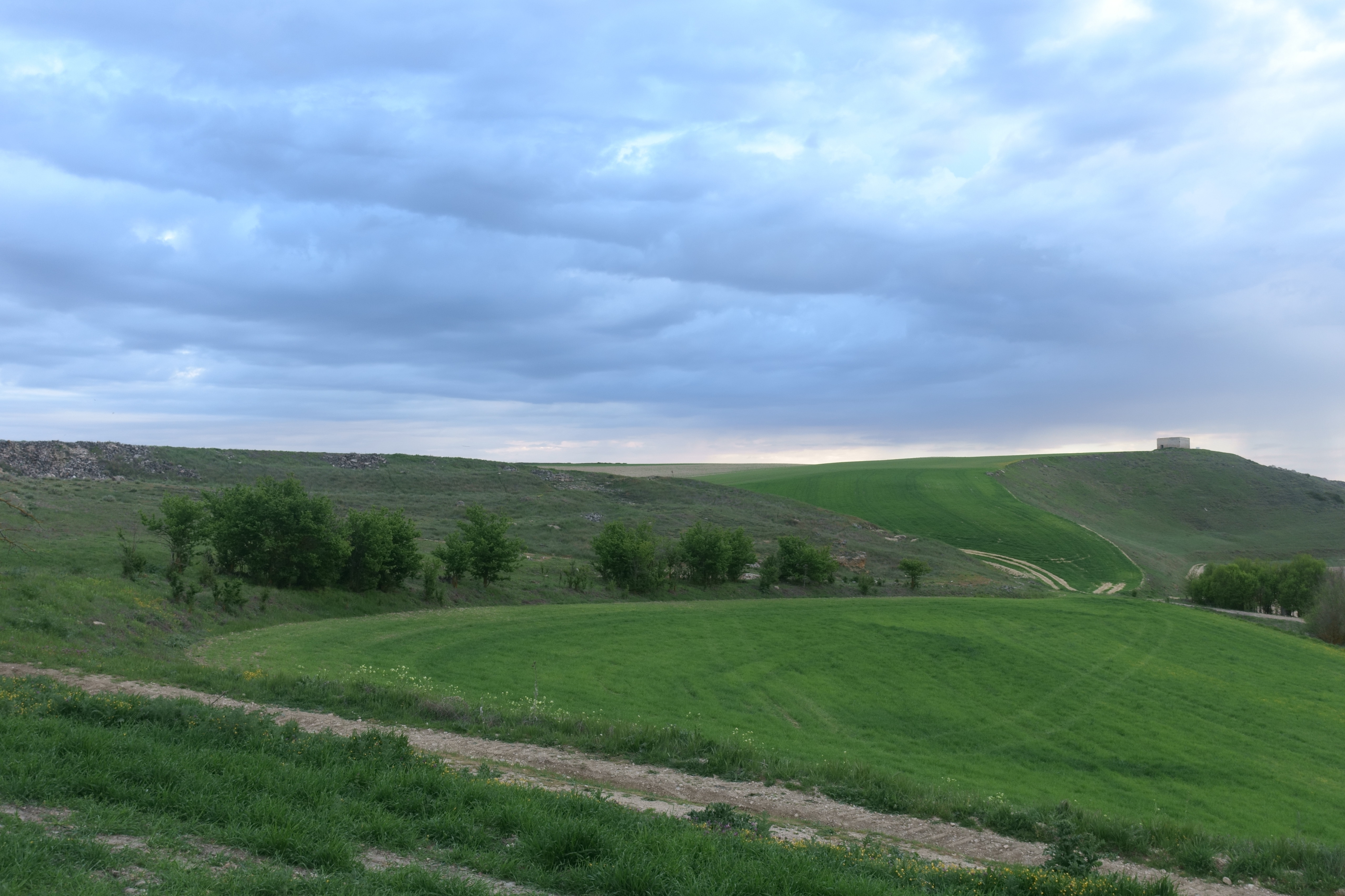 Vista del Cuarto de Bayona, lugar donde se ubicaba Contrebia Carbica, desde el norte (Villas Viejas, Cuenca).